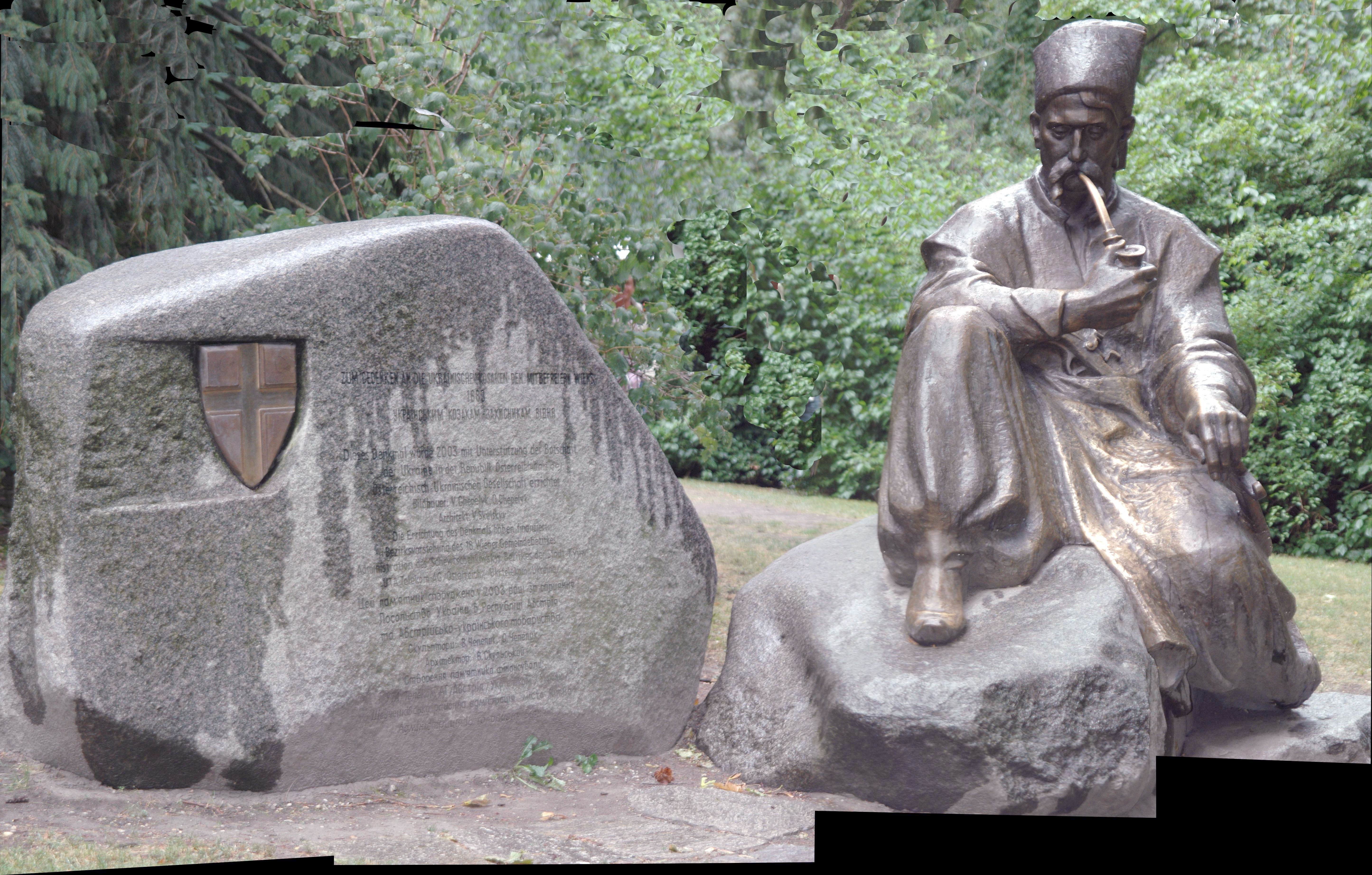 Statue im Türkenschanzpark